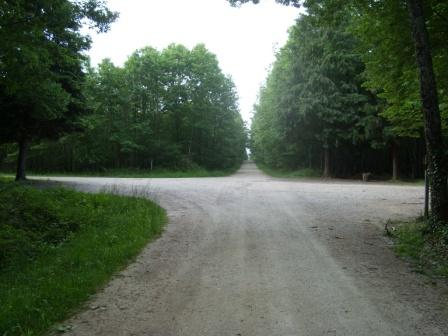 foret de troncais korsning